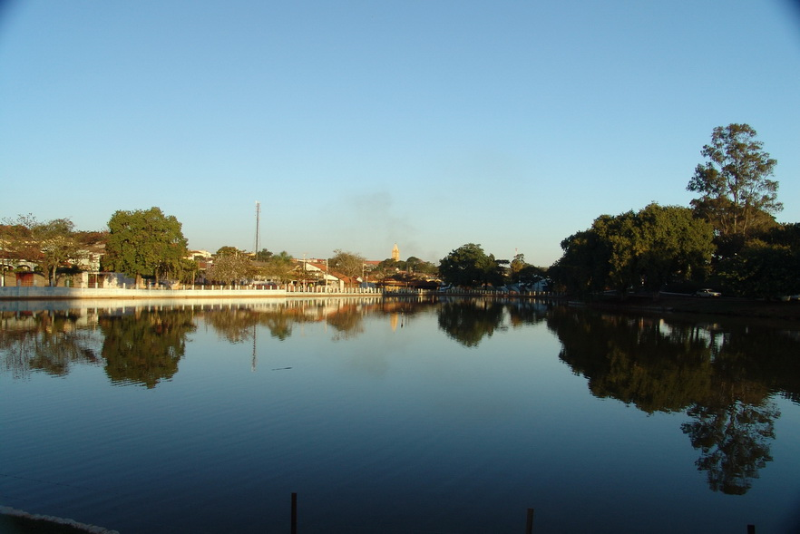 Imagem do município de Ipaussu, estado de São Paulo, Brasil.